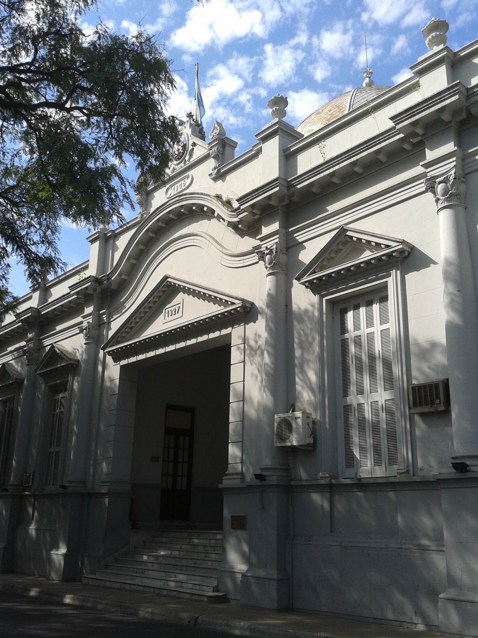 Legislatura Correntina.